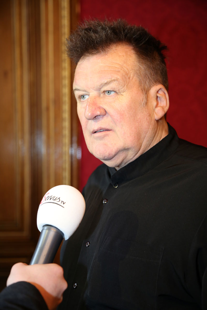 Wilfried-2325